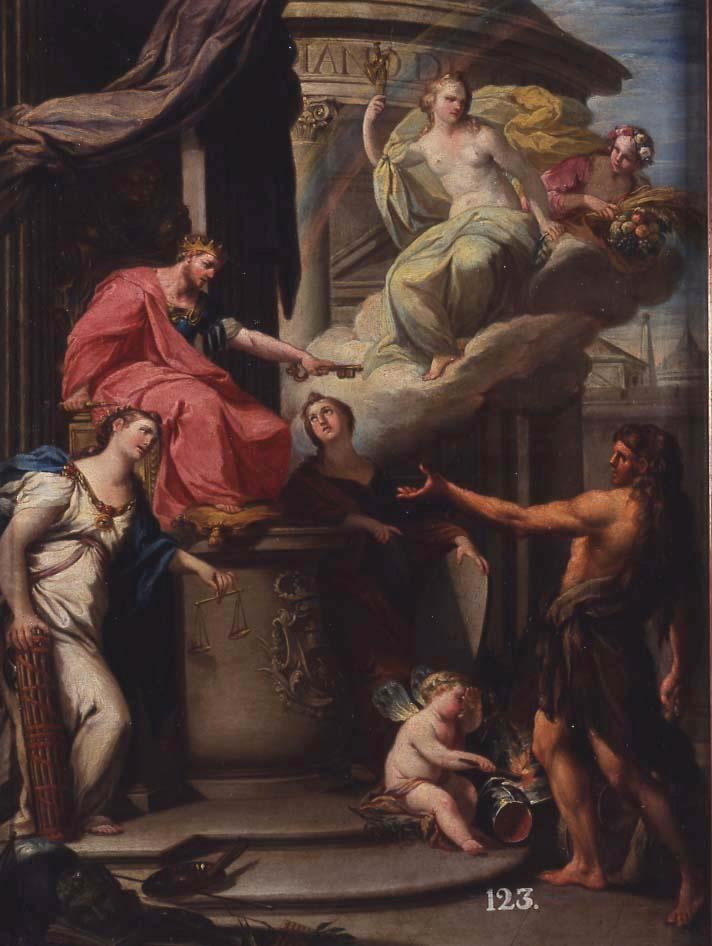 La obra es una representación alegórica de la paz.